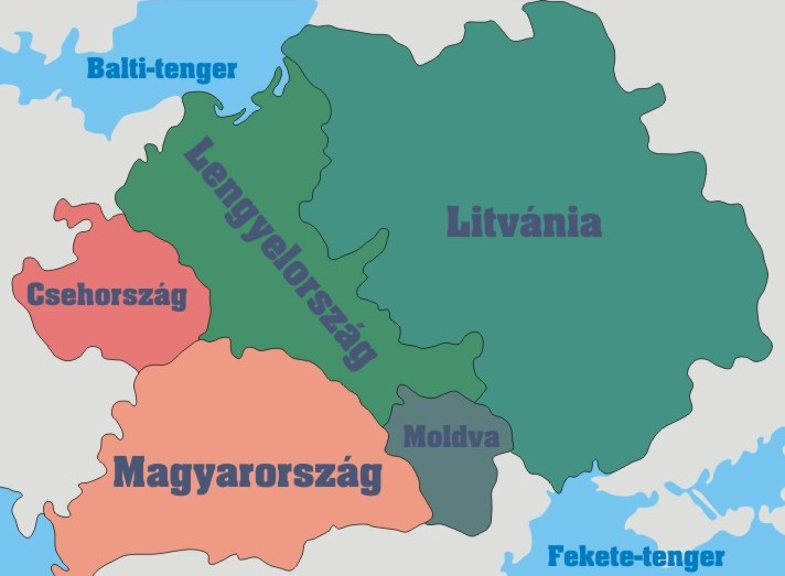 A Jagellók országai a 16. század elején